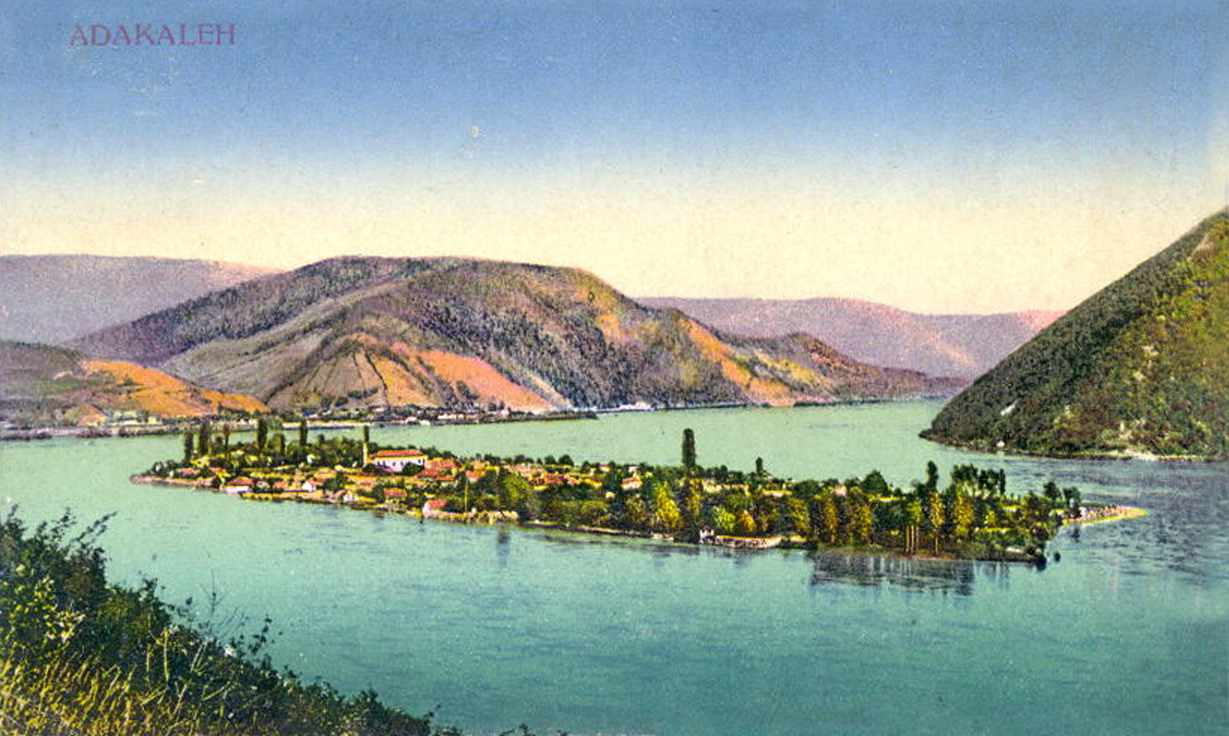 Ada Kaleh szigete 1909-ben (festmény)